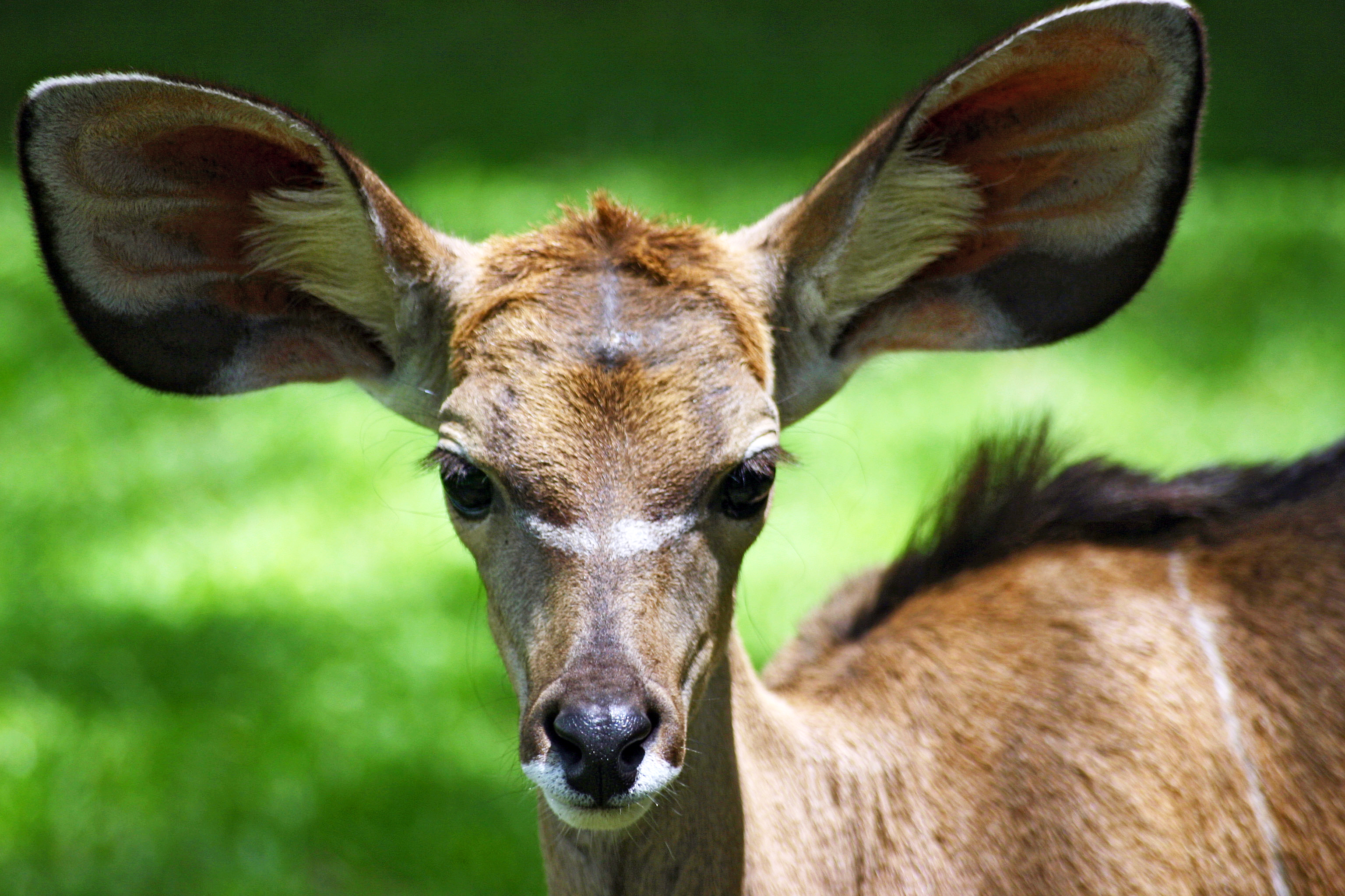 Pet baby kudu, Lewa game park, Kenya.bigears